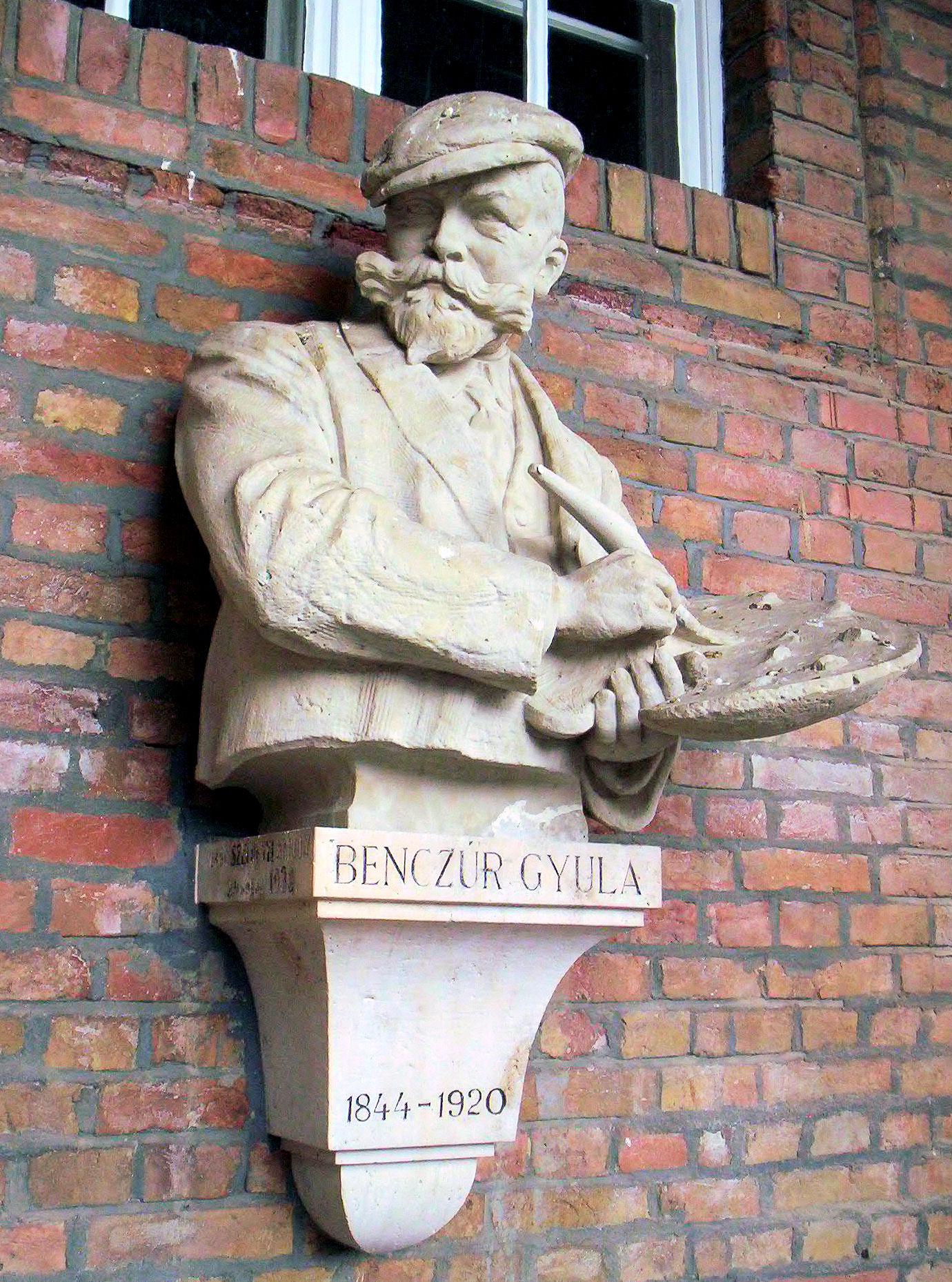 Benczúr Gyula szobra Szegeden. (Kisfaludy Strobl Zsigmond alkotása, gróf Széchenyi Károly ajándéka – 1930)